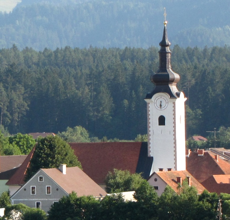 Šmartno pri Slovenj Gradcu. Pogled je iz bližnjih Krnic oz. Legna. Slika je vzeta iz osebnega arhiva.